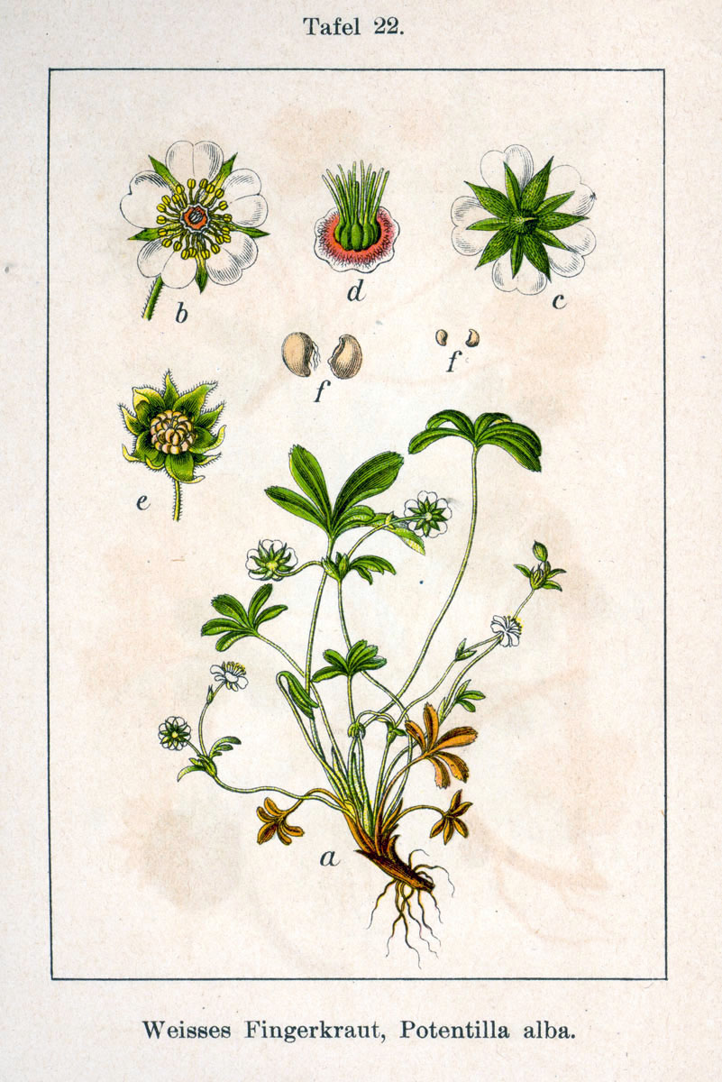 Potentilla alba L. Origina Description Weisses Fingerkraut, Potentilla alba